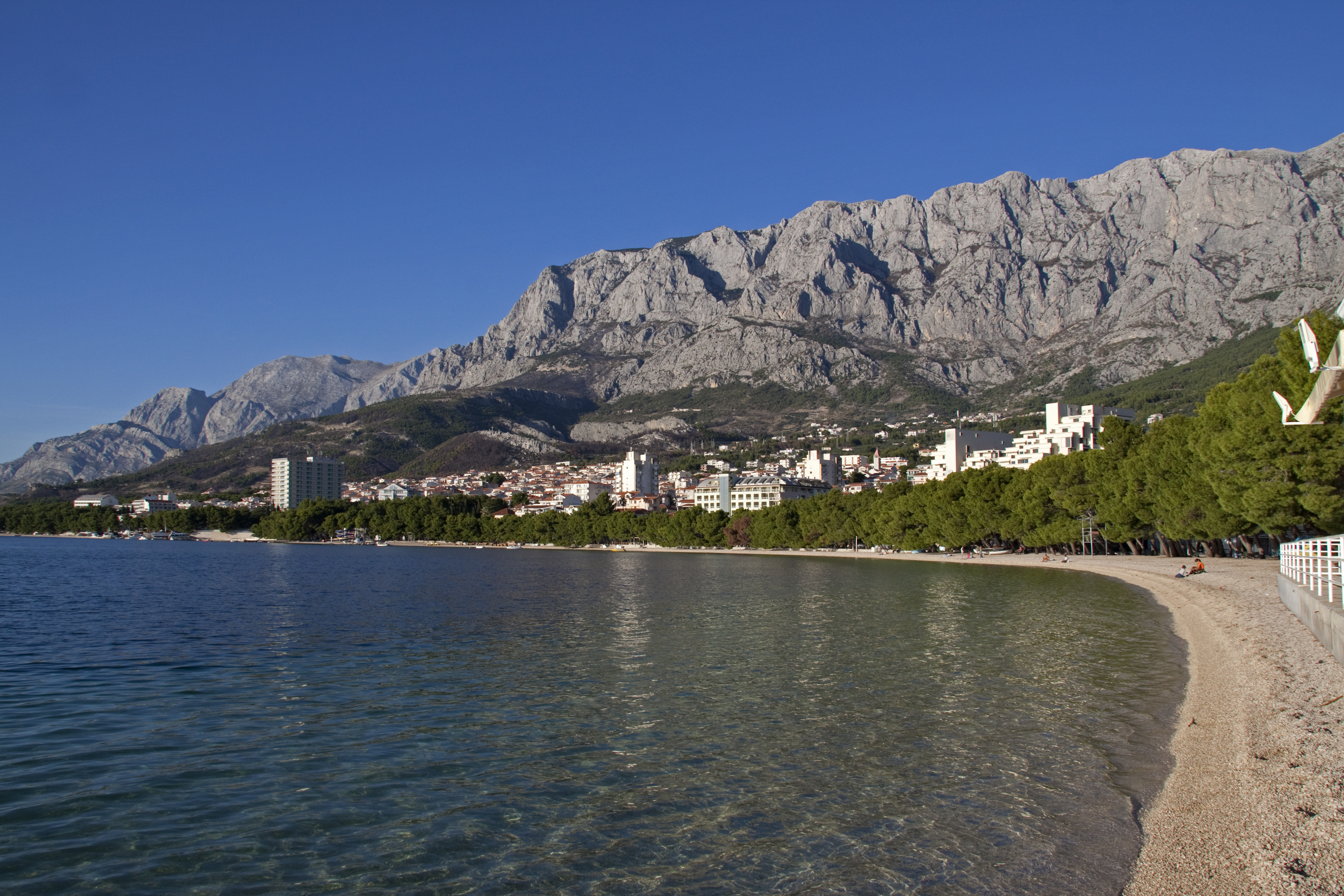 Makarska Beach 1